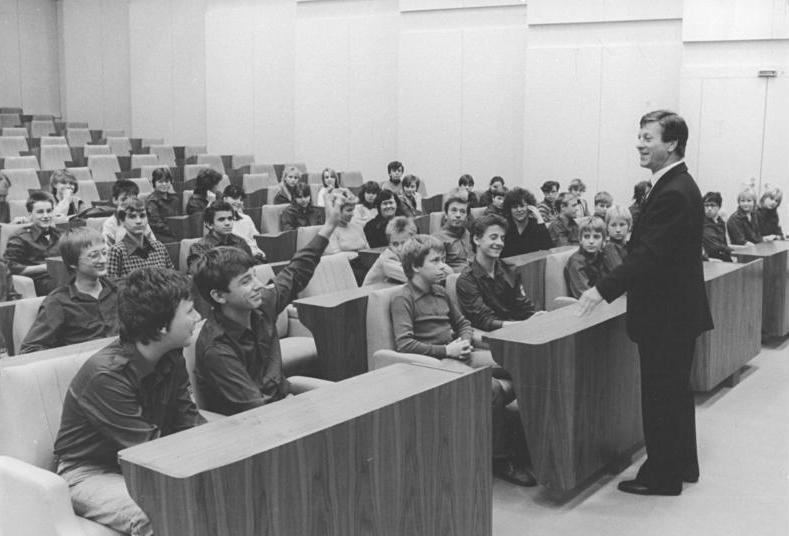 Berlin, Jugendstunde in der Volkskammer ADN-ZB Grimm 7.11.84 Berlin: 30 Jahre Jugendweihe. Zu einer Jugendweihestunde im Hause der Volkskammer der DDR trafen sich Jugendliche der 18. Oberschule Marzahn mit dem Abgeordneten der obersten Volksvertretung Manfred Grund (LDPD). Anhand von Beispielen erläuterte er die Arbeit der Abgeordneten in den Fraktionen, Ausschüssen und bei Arbeitsgruppeneinsätzen.